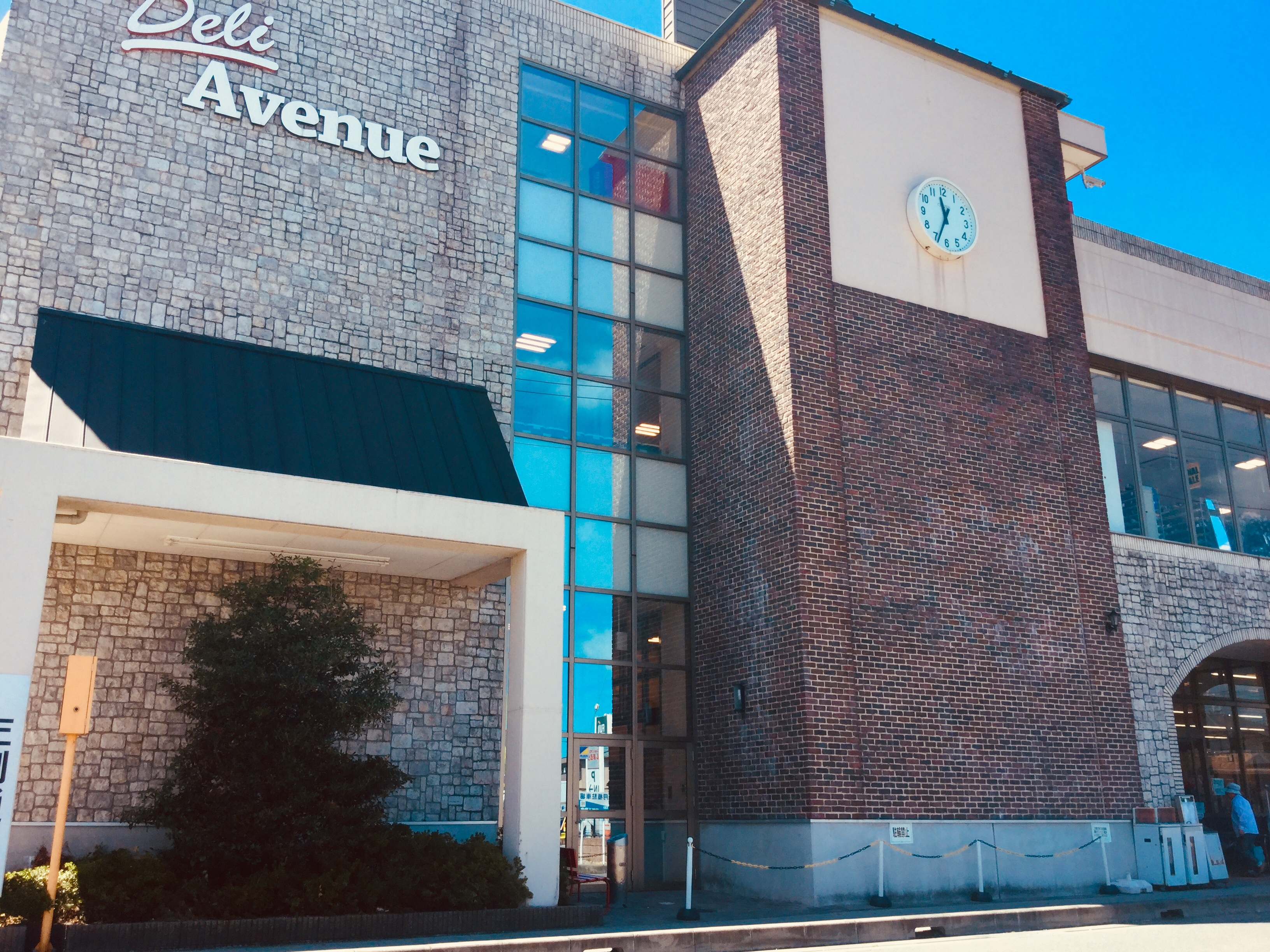 FUJIスーパー寒川店